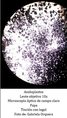 Lente objetivo 10x Microscopio campo claro